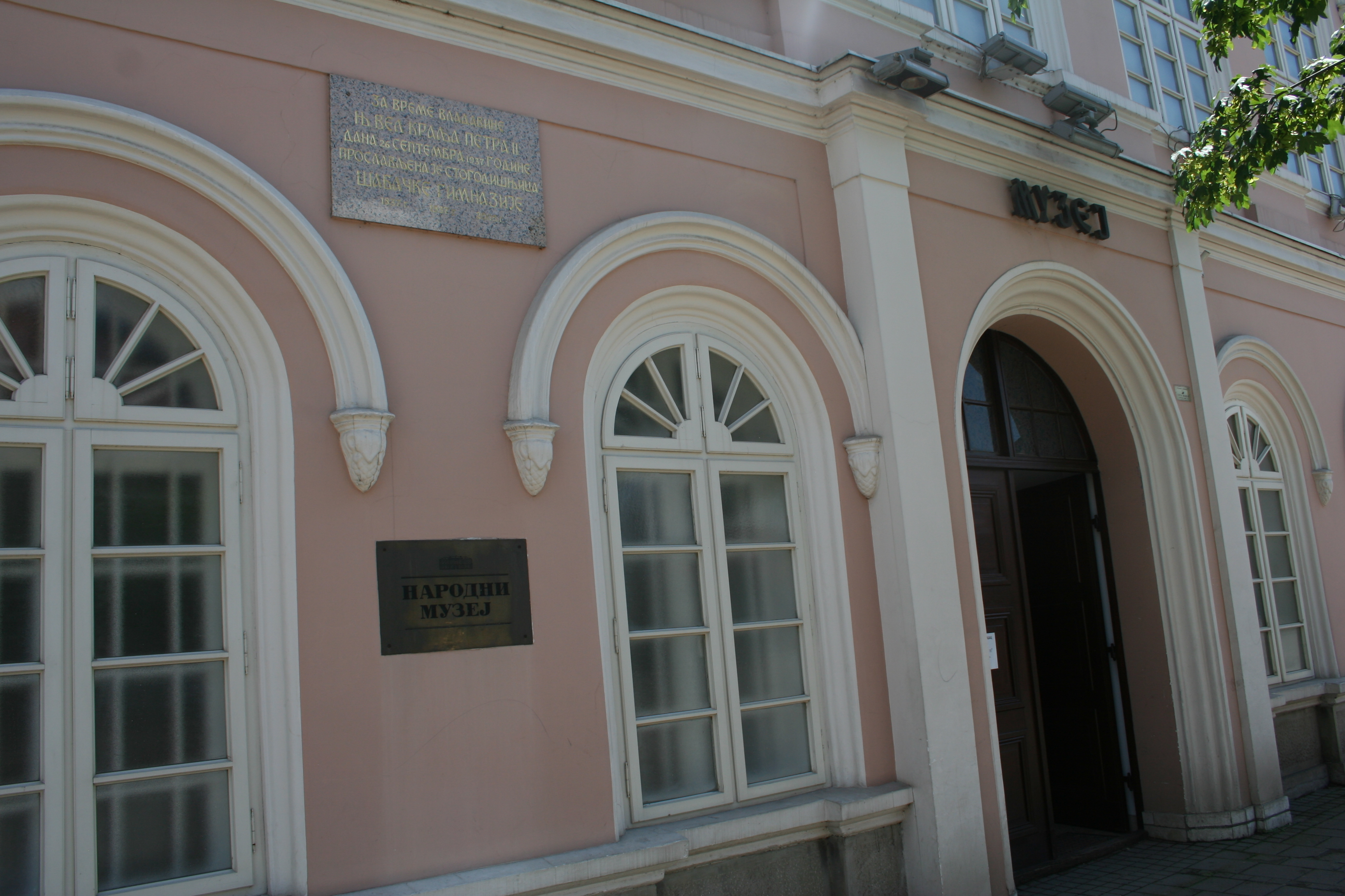 Zgrada Narodnog muzeja (zgrada polugimnazije)